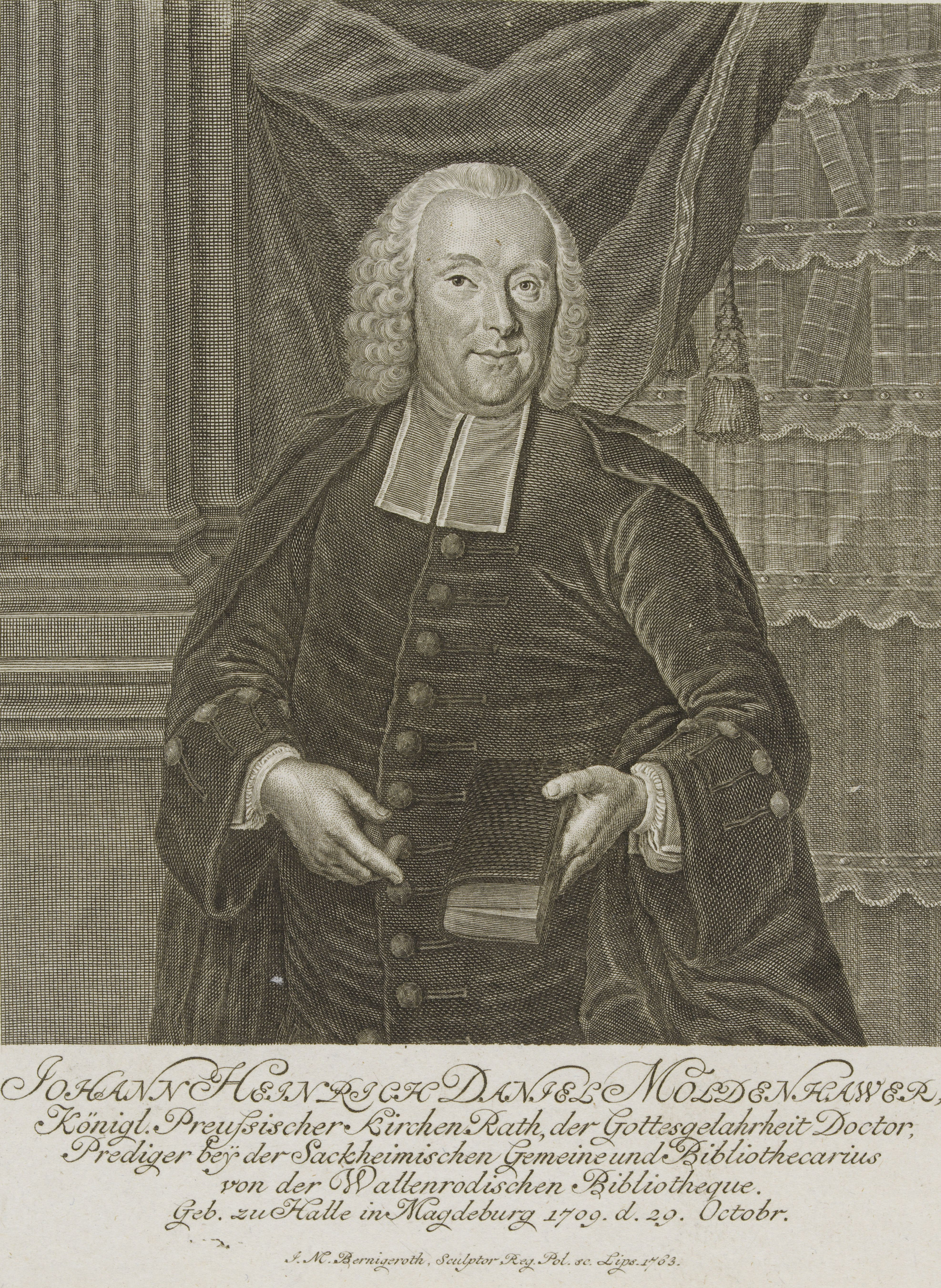 Johann Heinrich Daniel Moldenhawer, Königl. Preussischer kirchen Rath, der Gottesgelahtheit Doctor, Prediger bey der Sackheimischen Gemeine und Bibliothecarius von der Wattenrodischen Bibliotheque